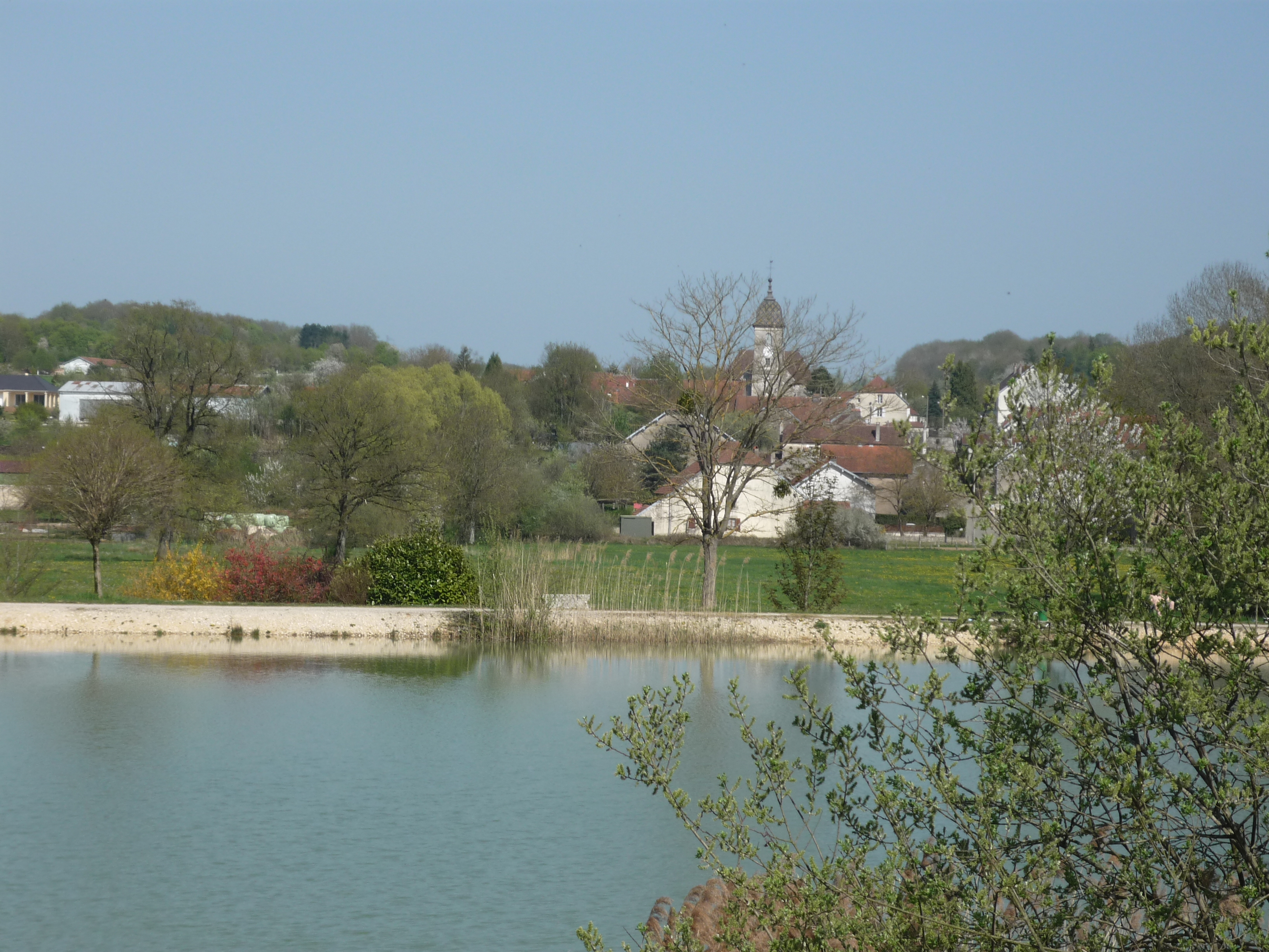 Gourgeon, vue depuis l'étang